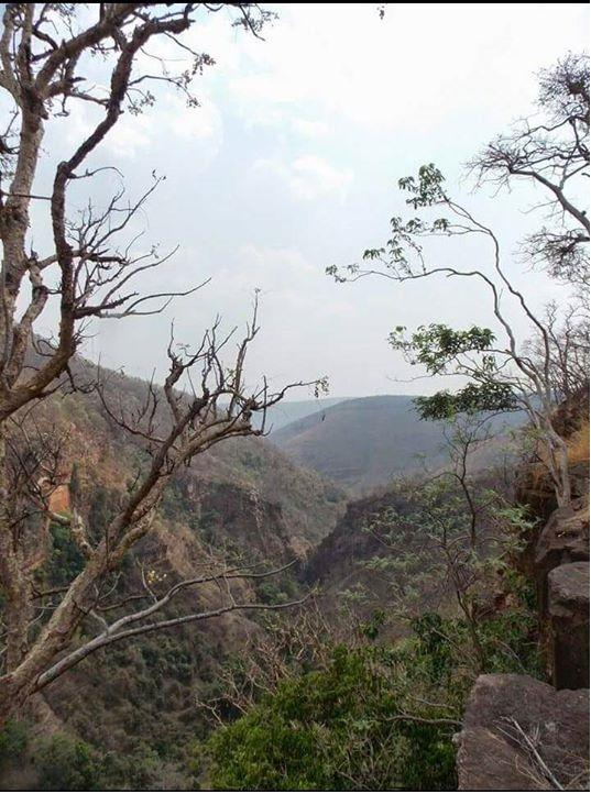 సలేశ్వరం కొండల దృశ్యం